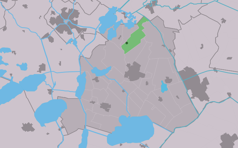 Kaartsje fan himrik fan Eagmaryp